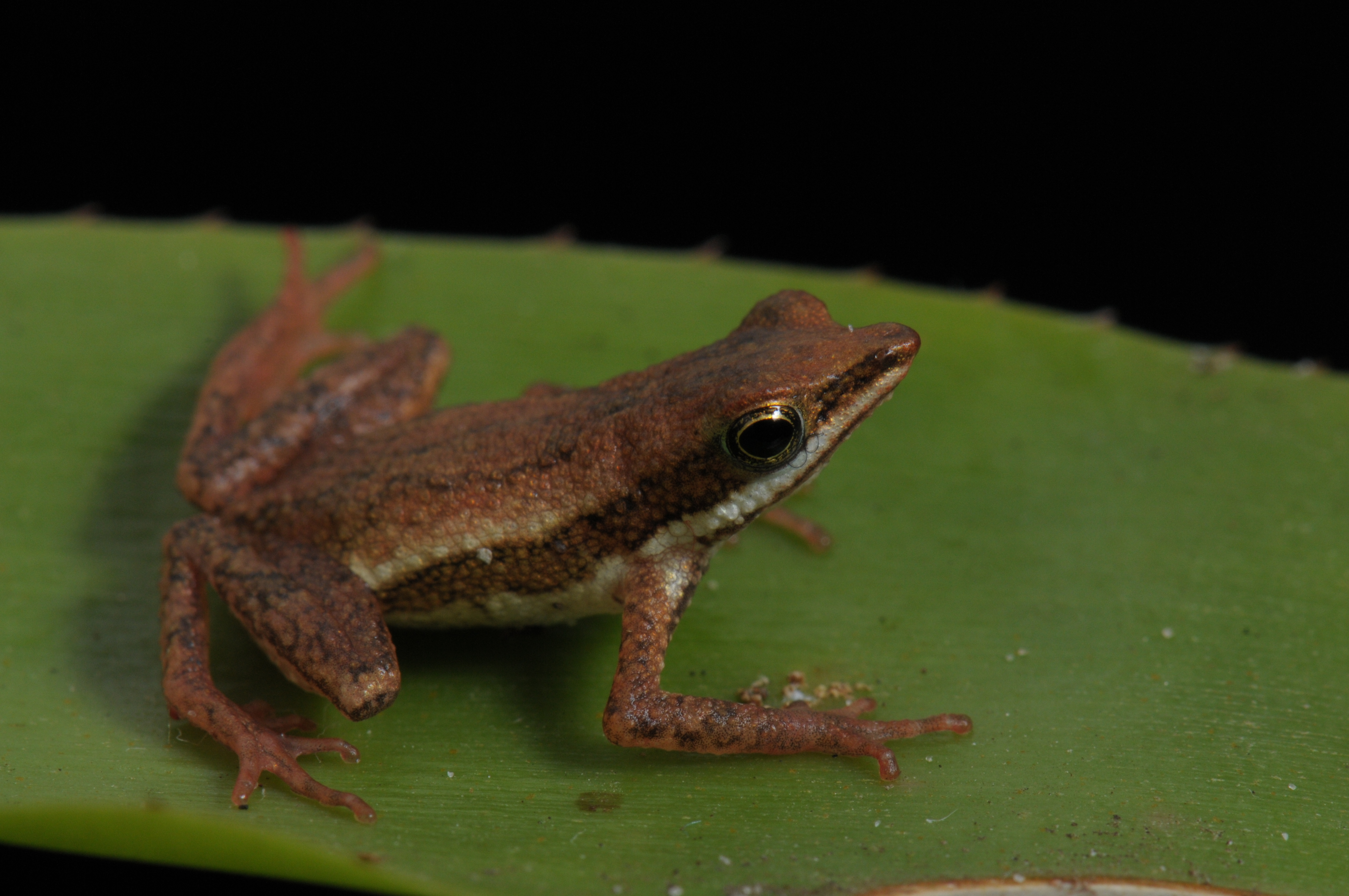 Sapo - de - bromélia - Dendrophryniscus leucomystax - Espécie endêmica da Mata Atlântica e dependente de bromélia.